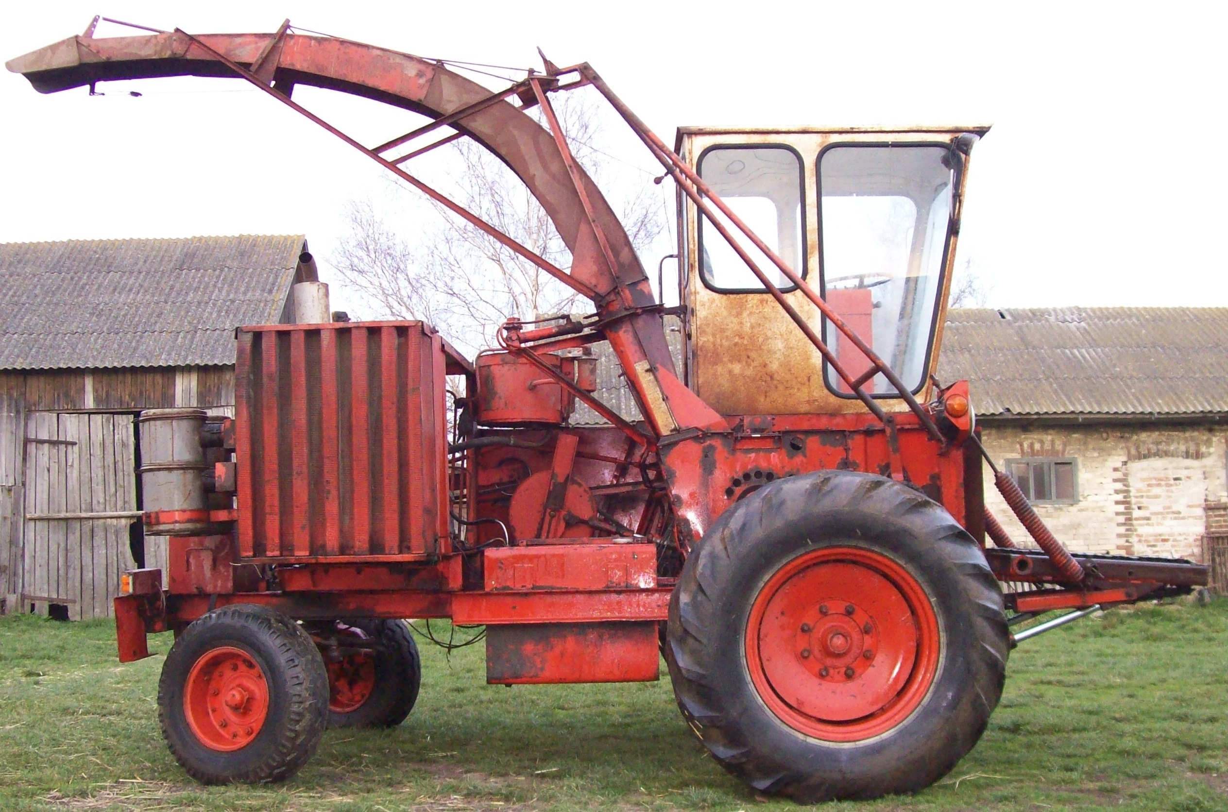 Sieczkarnia Z320 - widok z prawej